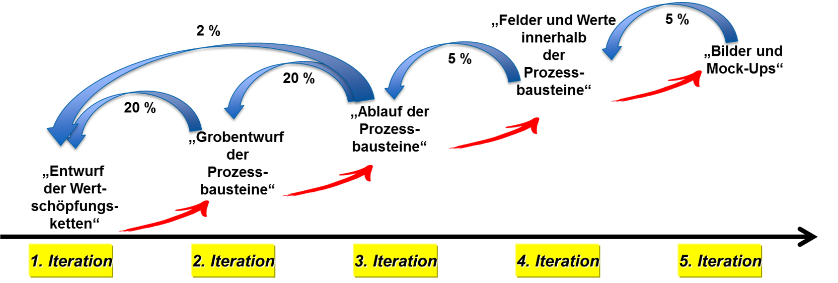 IPP Vorgehen